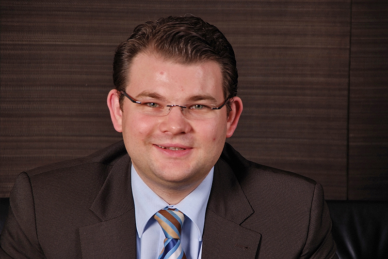 Ansgar Focke, Landtagsabgeordneter Niedersachsen, 16. Wahlperiode (Fotoprojekt Landtagsabgeordnete Niedersachsen am 24. und 25. November 2009)